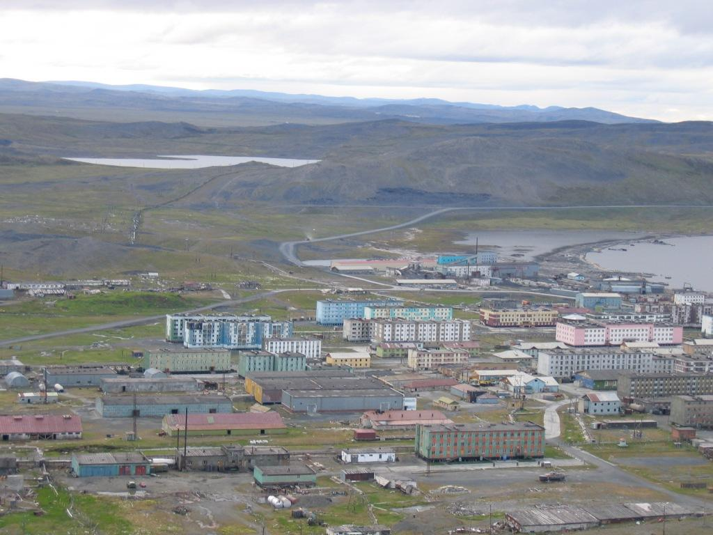 View on Tiksi